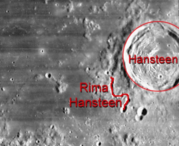 Rima Hansteen (Imagen de la Misión Lunar Orbiter)